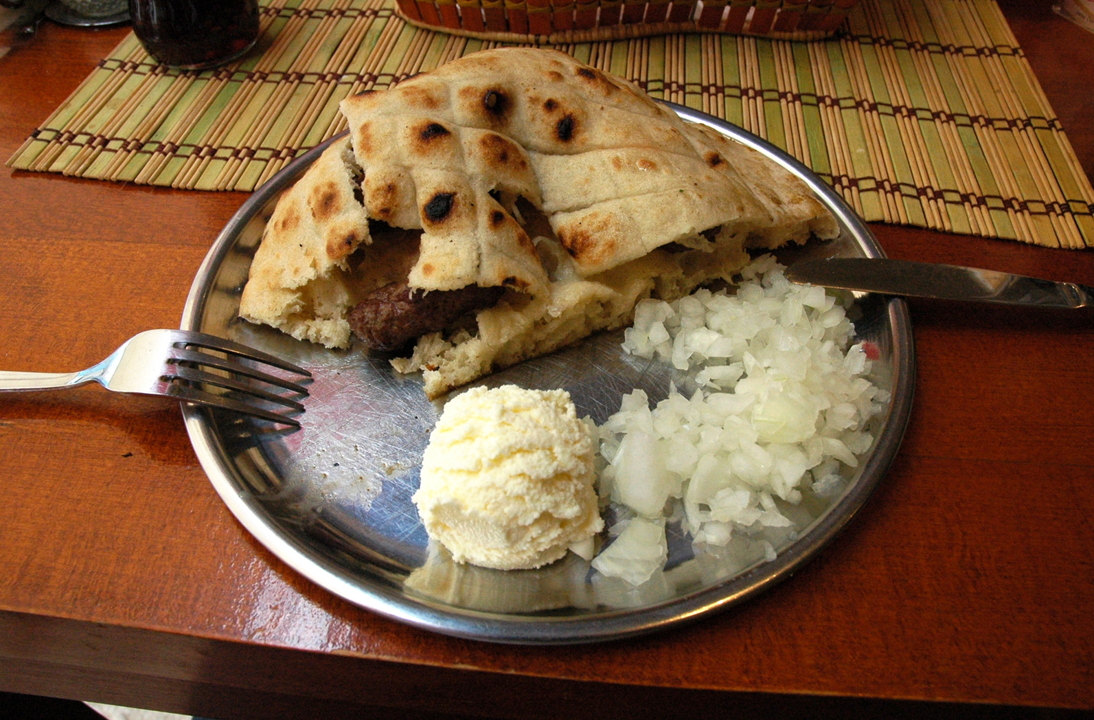 Cevapi sa kajmakom